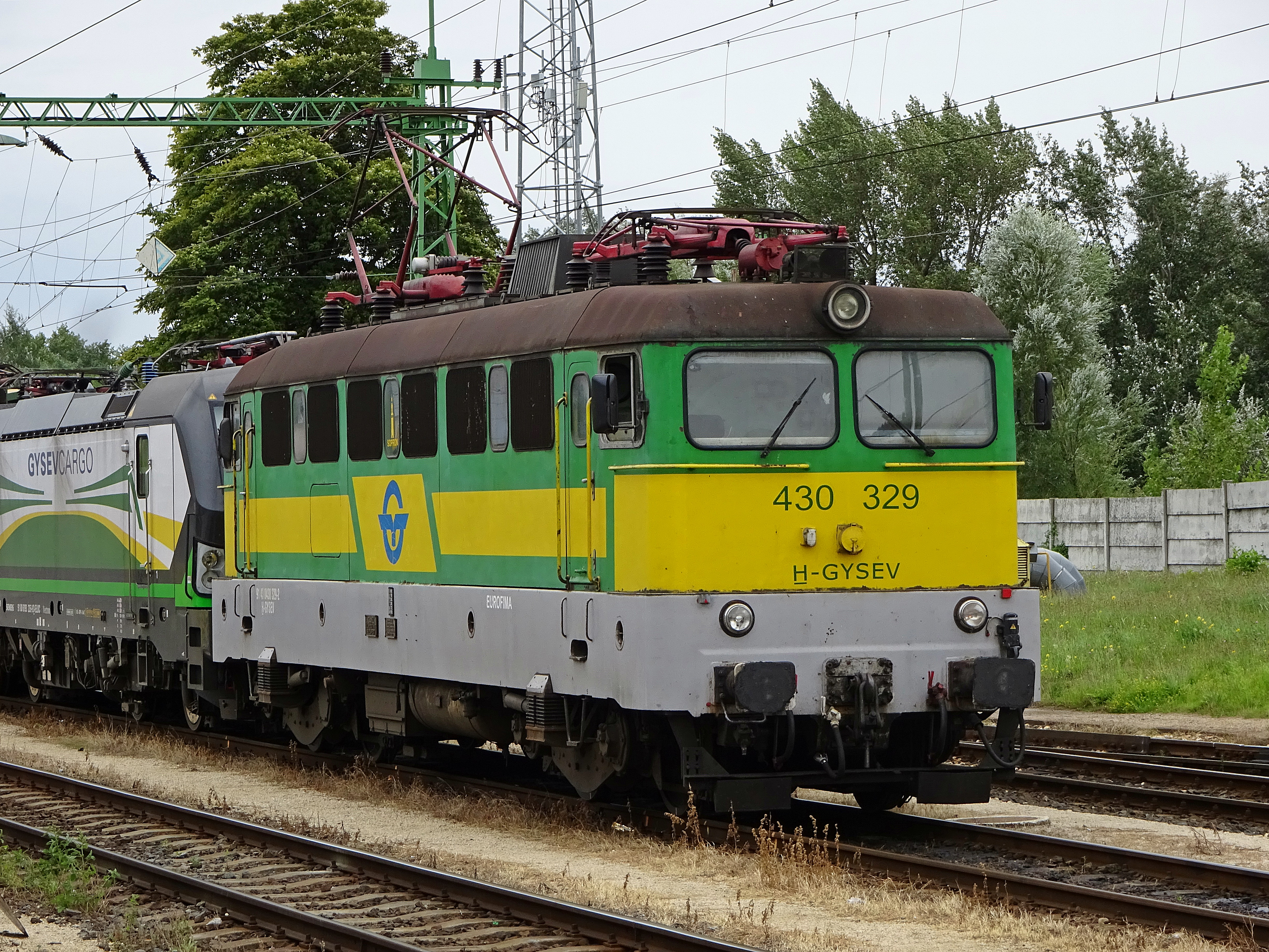 A GySEV 430 329-es pályaszámú V43-asa Sopronban, 2016. augusztus 22-én.